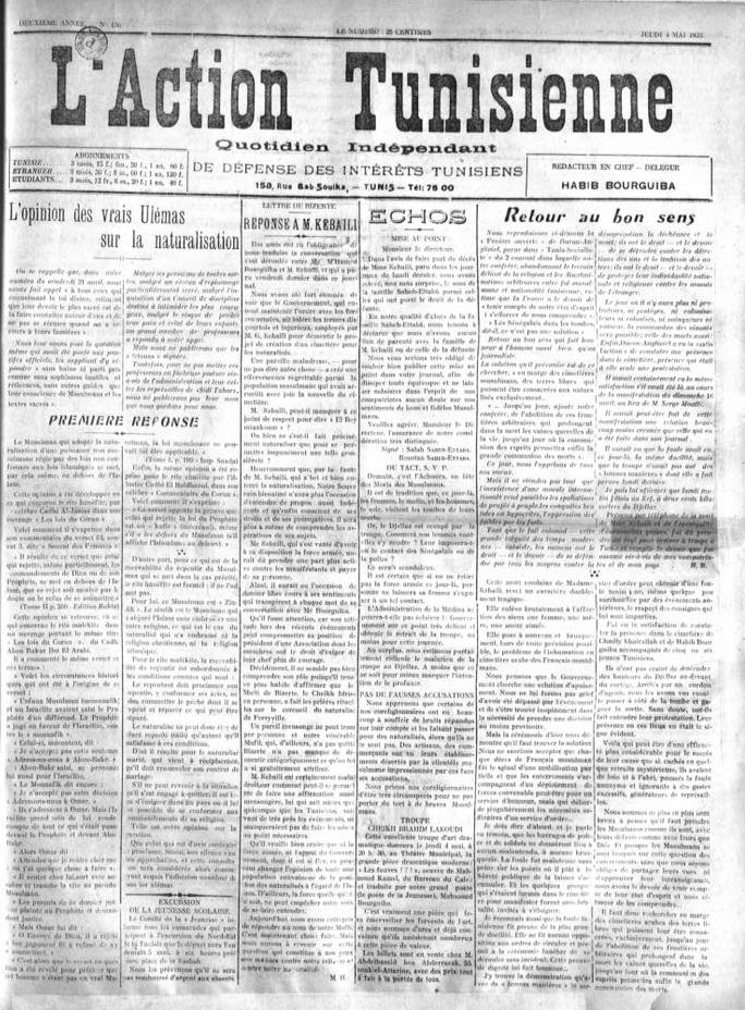 Première page du journal l'Action tunisienne du 4 mai 1933